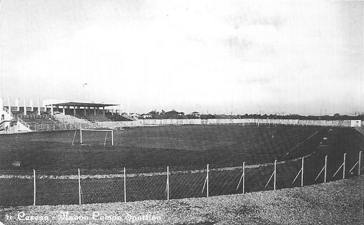 Il primo stadio appositamente costruito per l'A.C.Cesena nel 1957. Era costituito da una tribuna coperta e da una pista di atletica, oltre al campo da calcio.